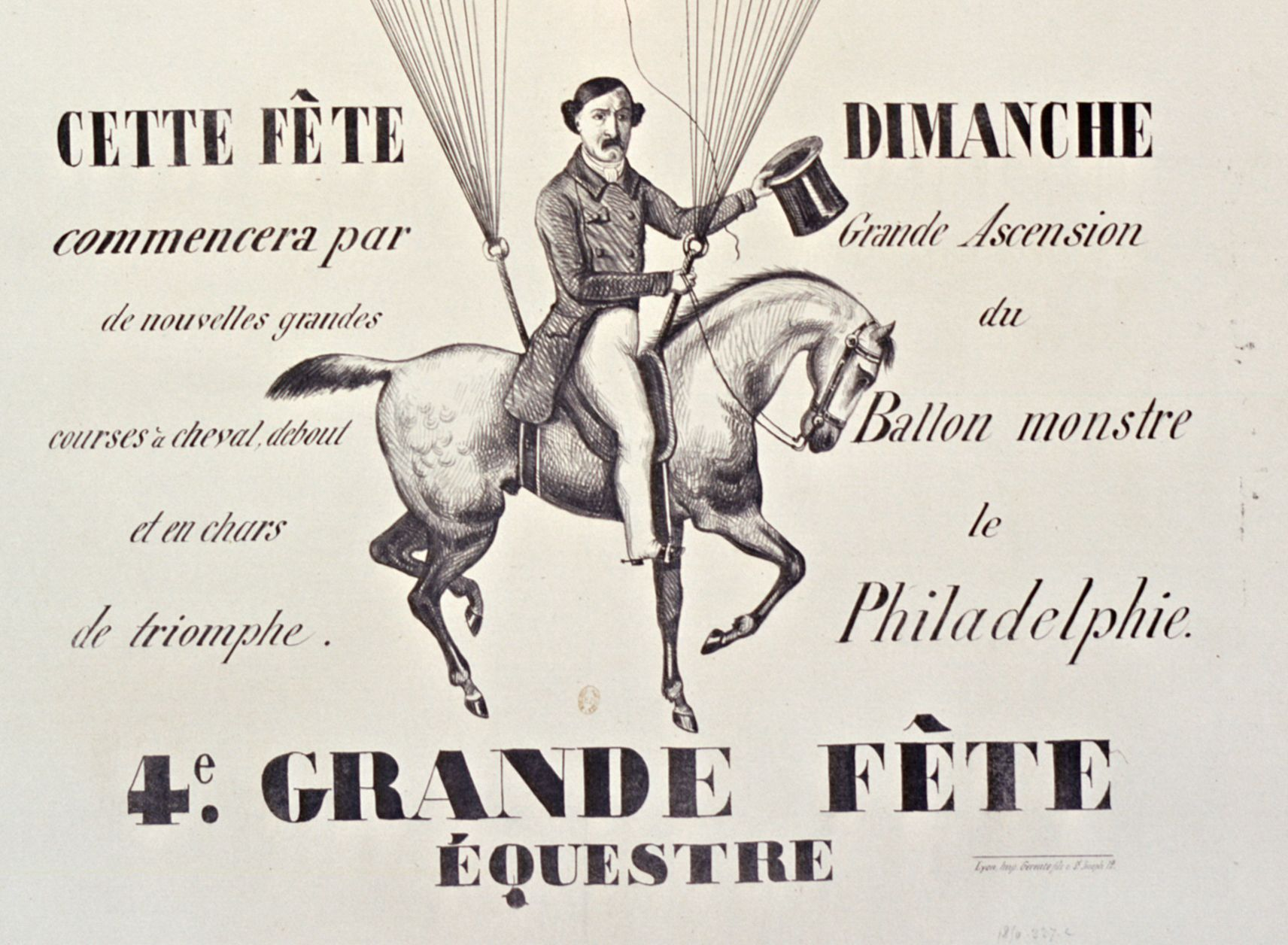 Détail d'une affiche pour la 4ème grande fête équestre de l'Hippodrome Soullier à Lyon, avec courses de chars, ascension d'aérostat.